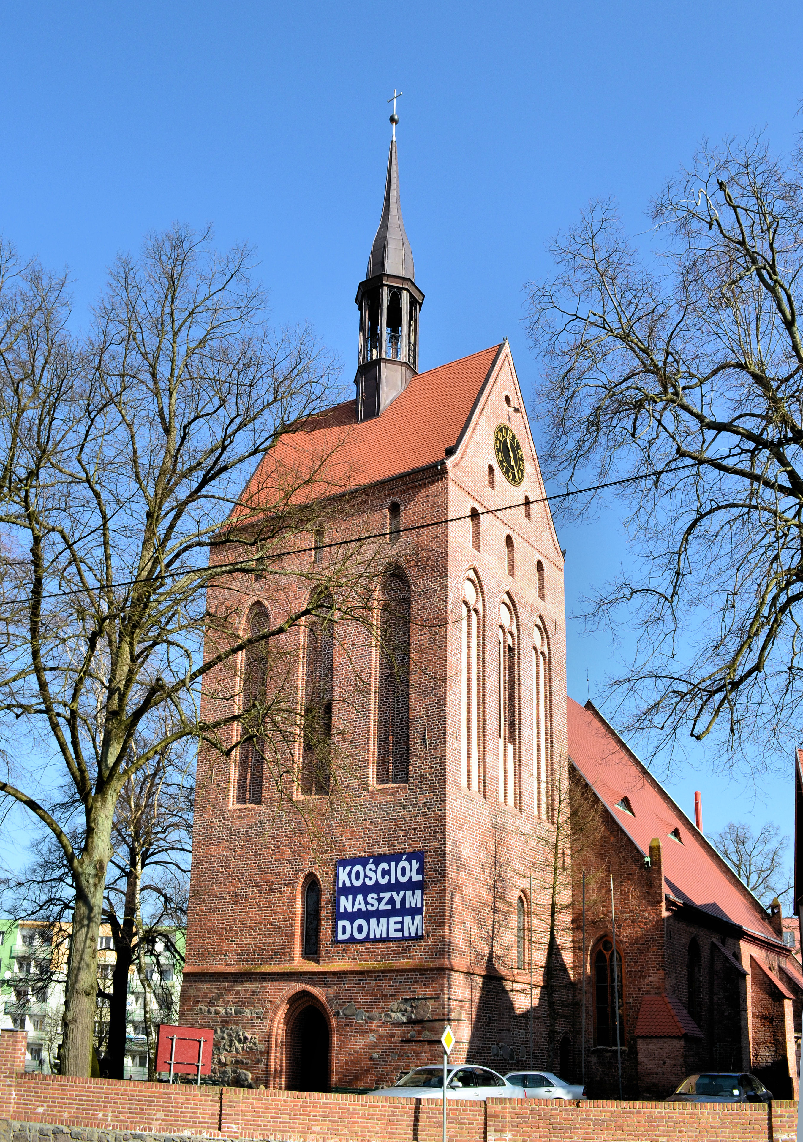 Kościół Wniebowzięcia NMP w Nowogardzie